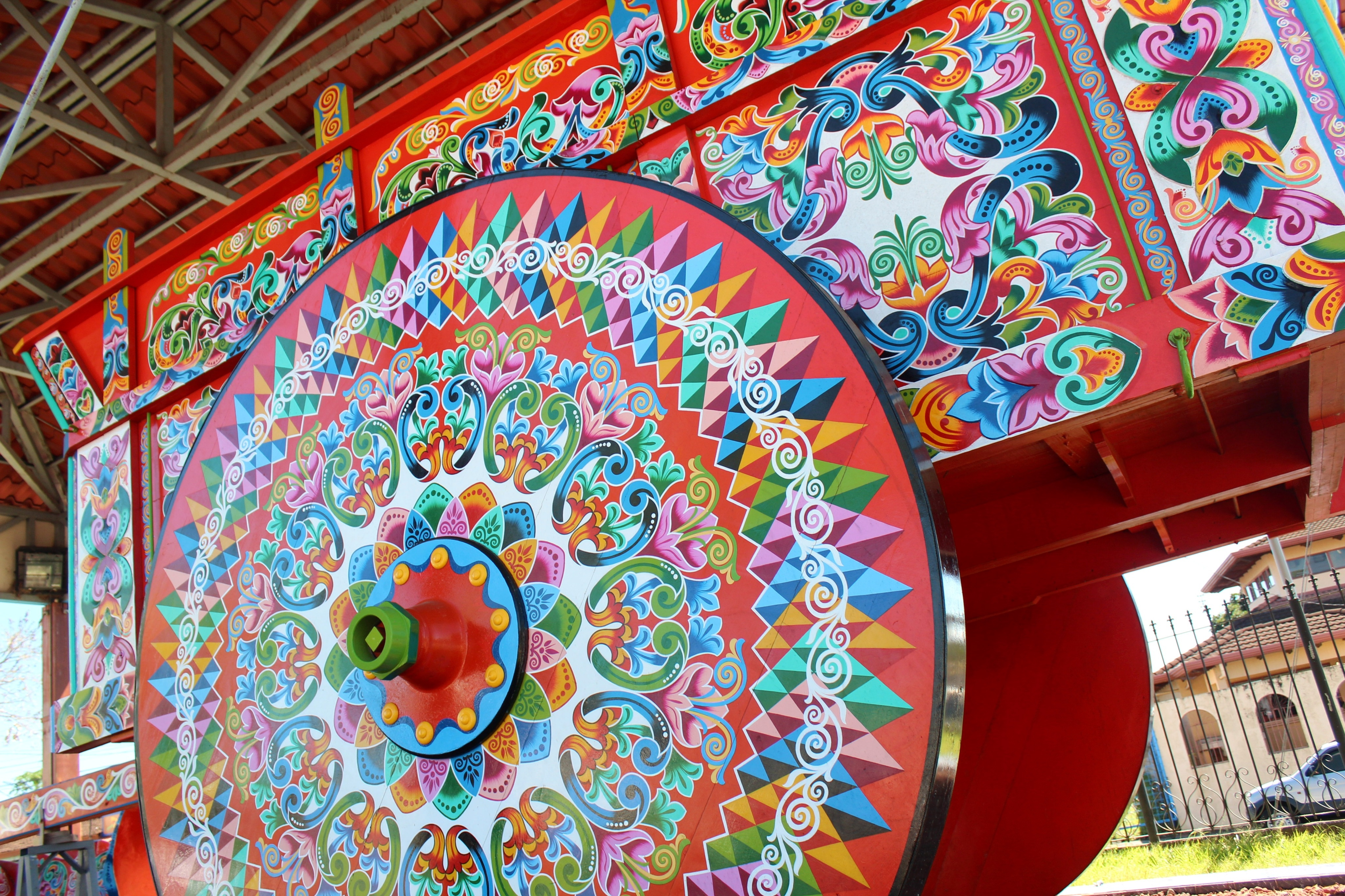 Primer plano de la carreta típica costarricense más grande del mundo, ubicada en Sarchí de Valverde Vega, Costa Rica.